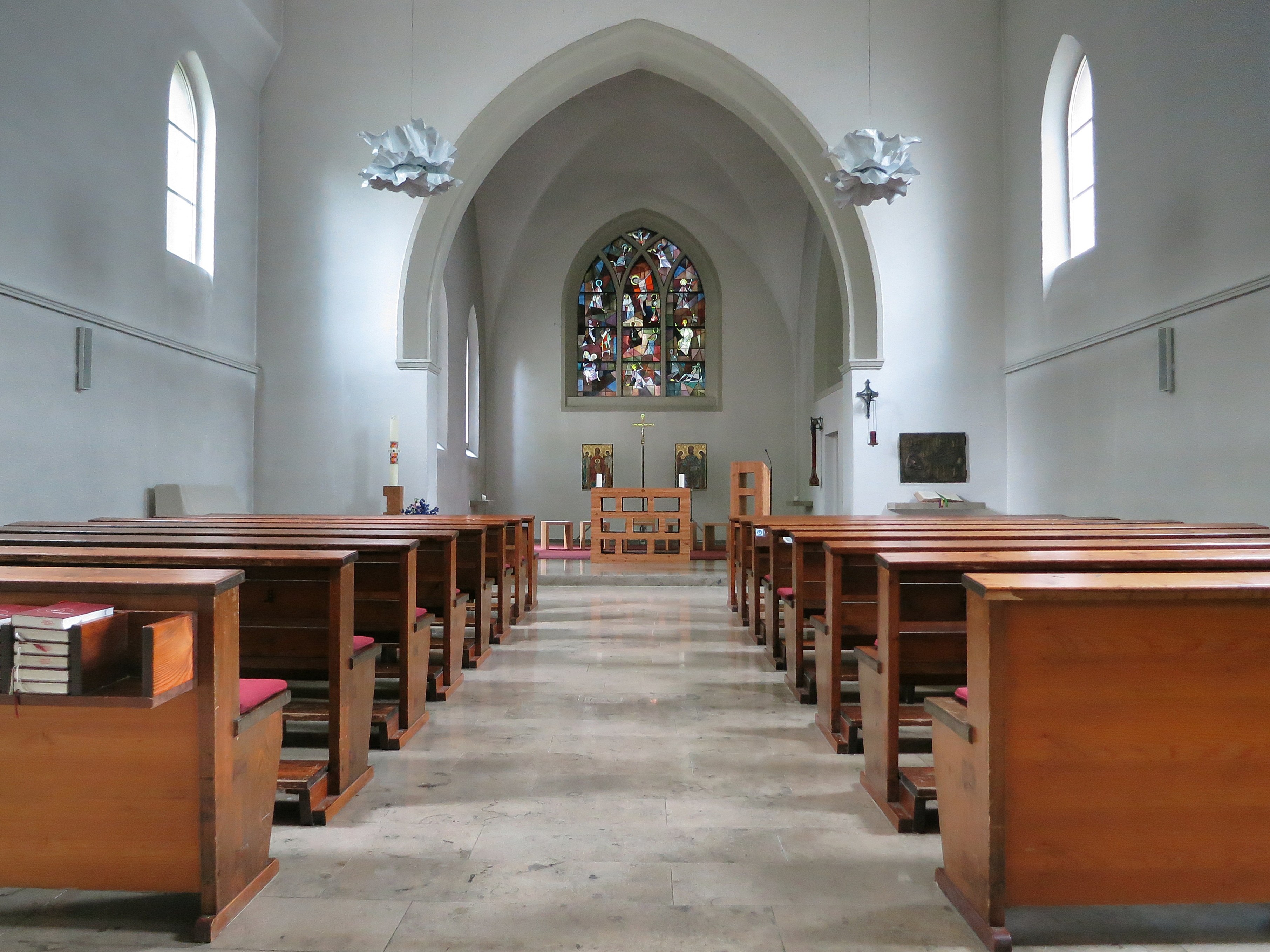 Innenansicht der Kirche St. Willibrord von der Empore zum Chor nach beendeter Renovierung. Aufnahme etwa aus NordWest nach SüdOst